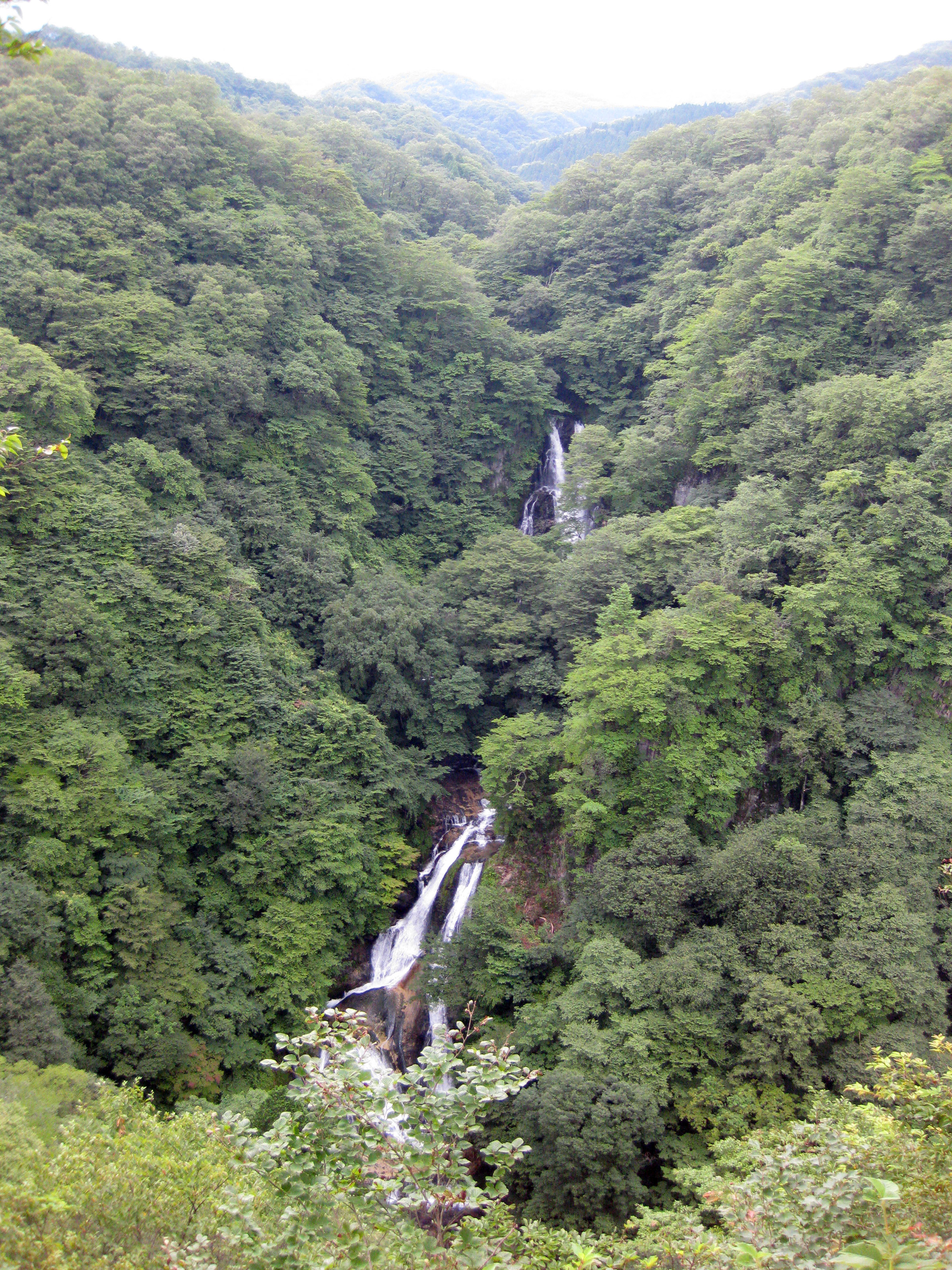 Kirifuri Falls (霧降の滝), Nikkō, Japan.